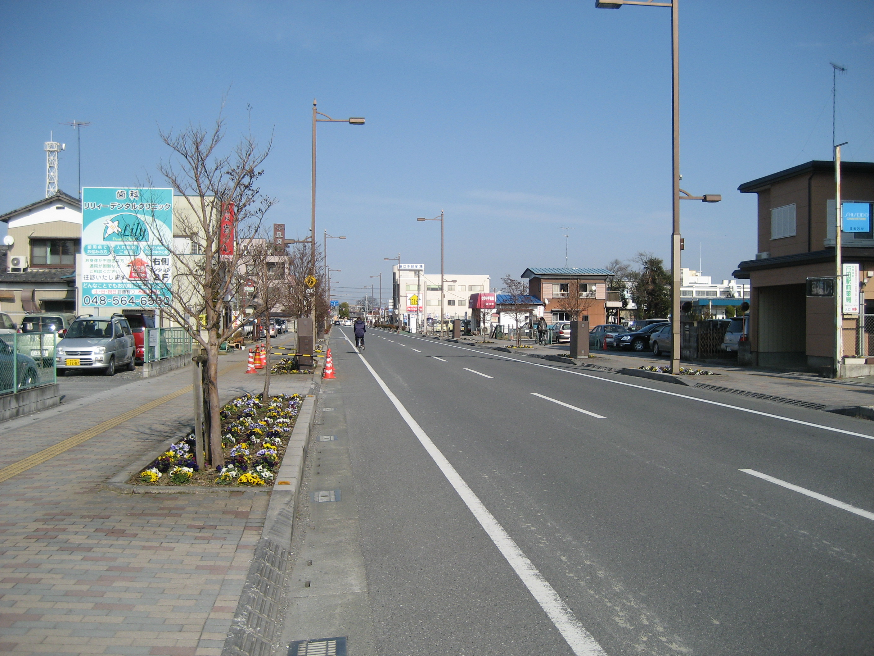 埼玉県道138号線行田市内